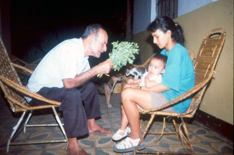 Don Solón Tello ikareando a niño. El íkaro, icaro o ícaro (en idioma shipibo-conibo: besho) es un canto mágico y sagrado. Son cantos utilizados por los curanderos y curanderas en rituales de sanación, son de varios tipos y tienen tres dimensiones: energéticas, sonoras y semánticas.​ Han sido declarados Patrimonio Cultural de la Nación en Perú el 15 de junio de 2016.